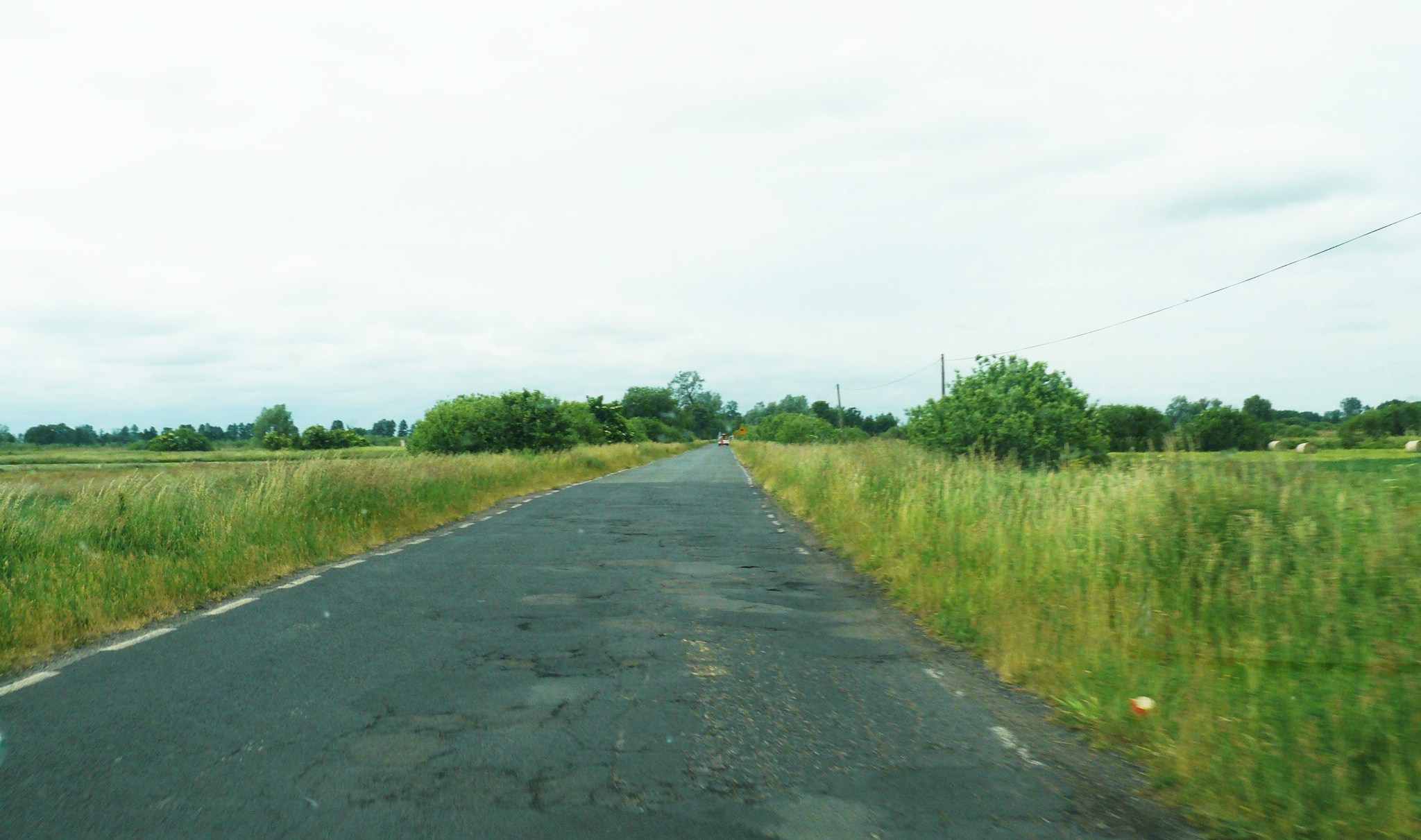 Droga wojewódzka nr 155 w Polsce pomiędzy St. Kurowem, a Pławinem.